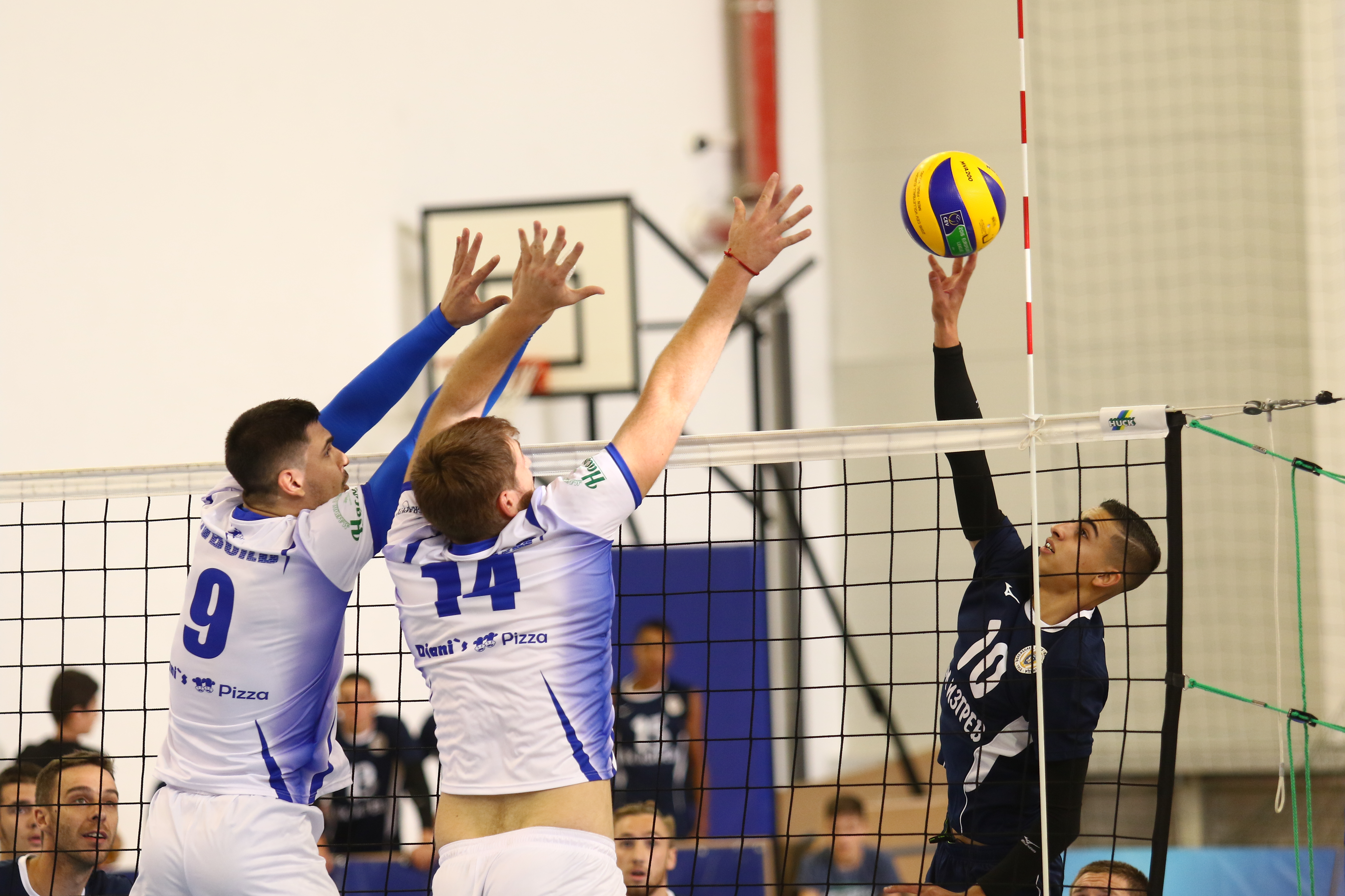 Момент от волейболният мач ВК Сливнишки герой - ВК ГРАД Белоградчик 3-0, 21-10-2017